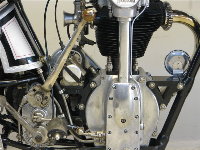 Norton 1929 CS1 500 cc 1 cyl ohc "Cricket Bat" engine